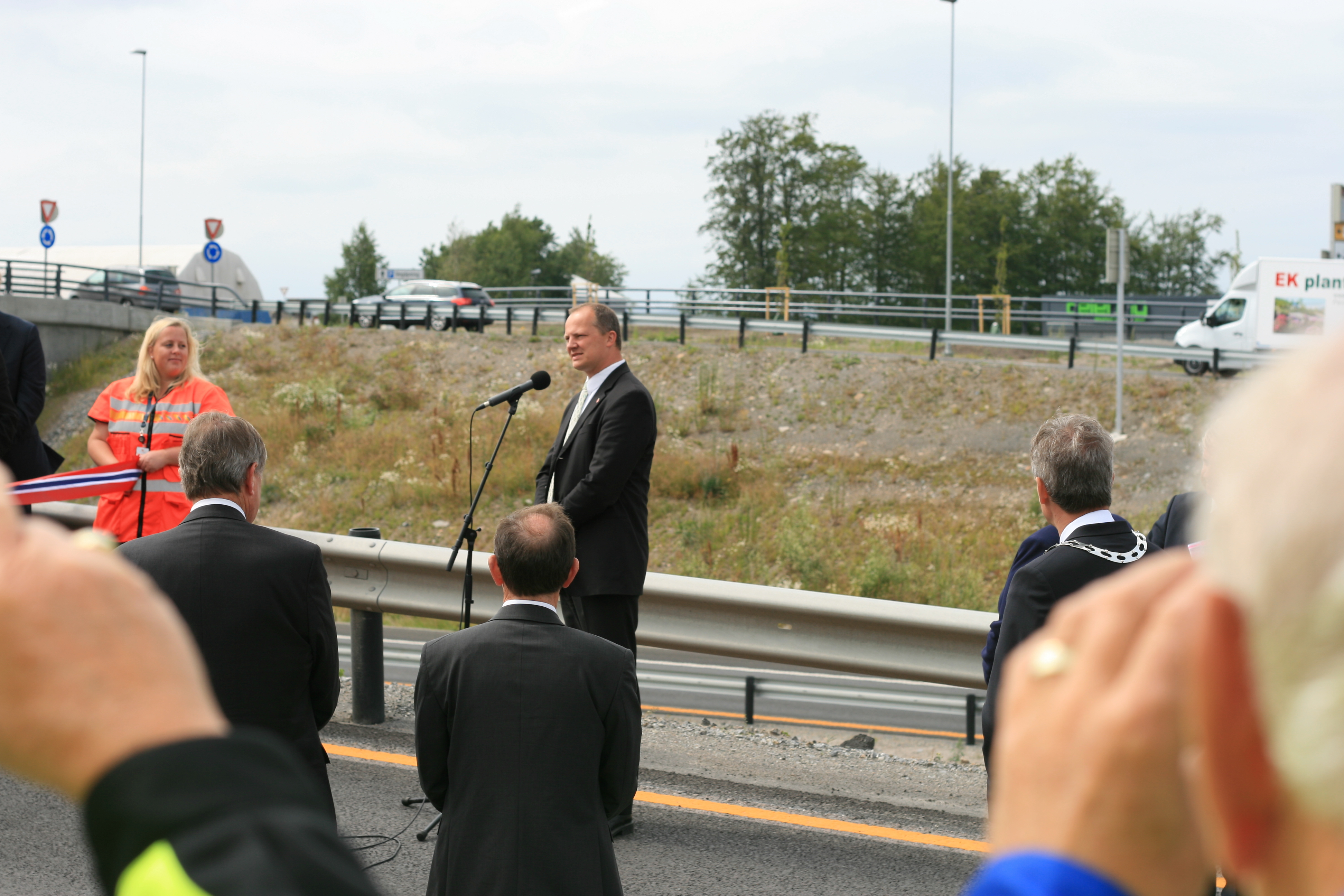 Samferdselsminister Ketil Solvik-Olsen holder tale i Fokserødkrysset i forbindelse med åpningen av E18 i Vestfold.